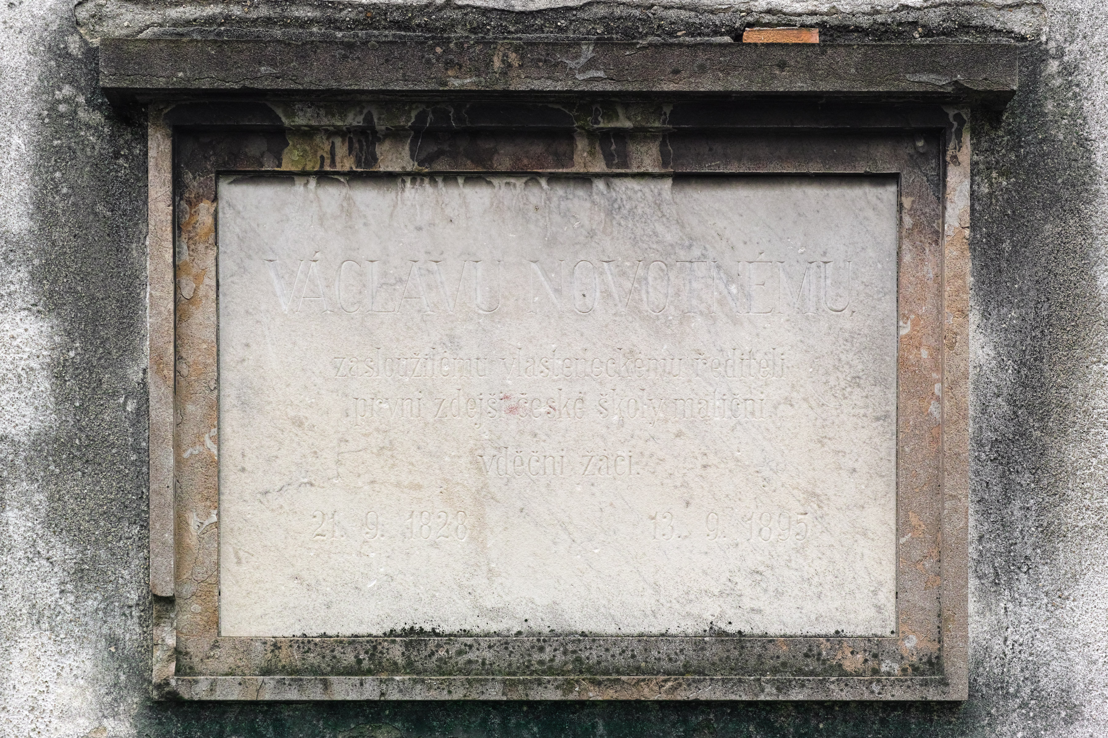 Pamětní deska řediteli Václavu Novotnému.